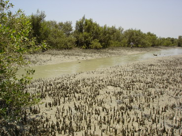 جنگل های حرا میناب